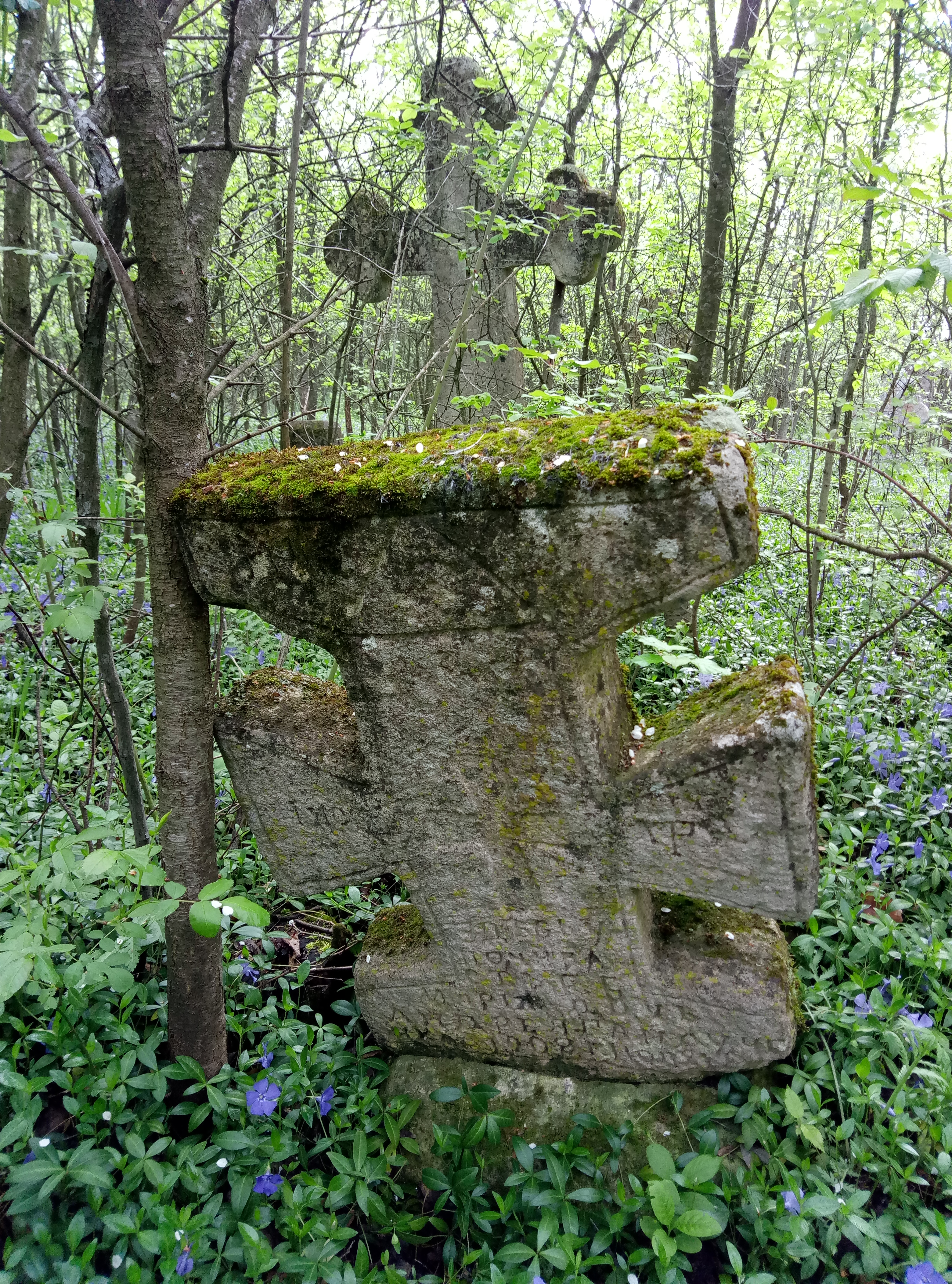 Старе кладовище в с. Рудківці Новоушицького району. Намогильні хрести (хрест на передньому плані 1908 р.)